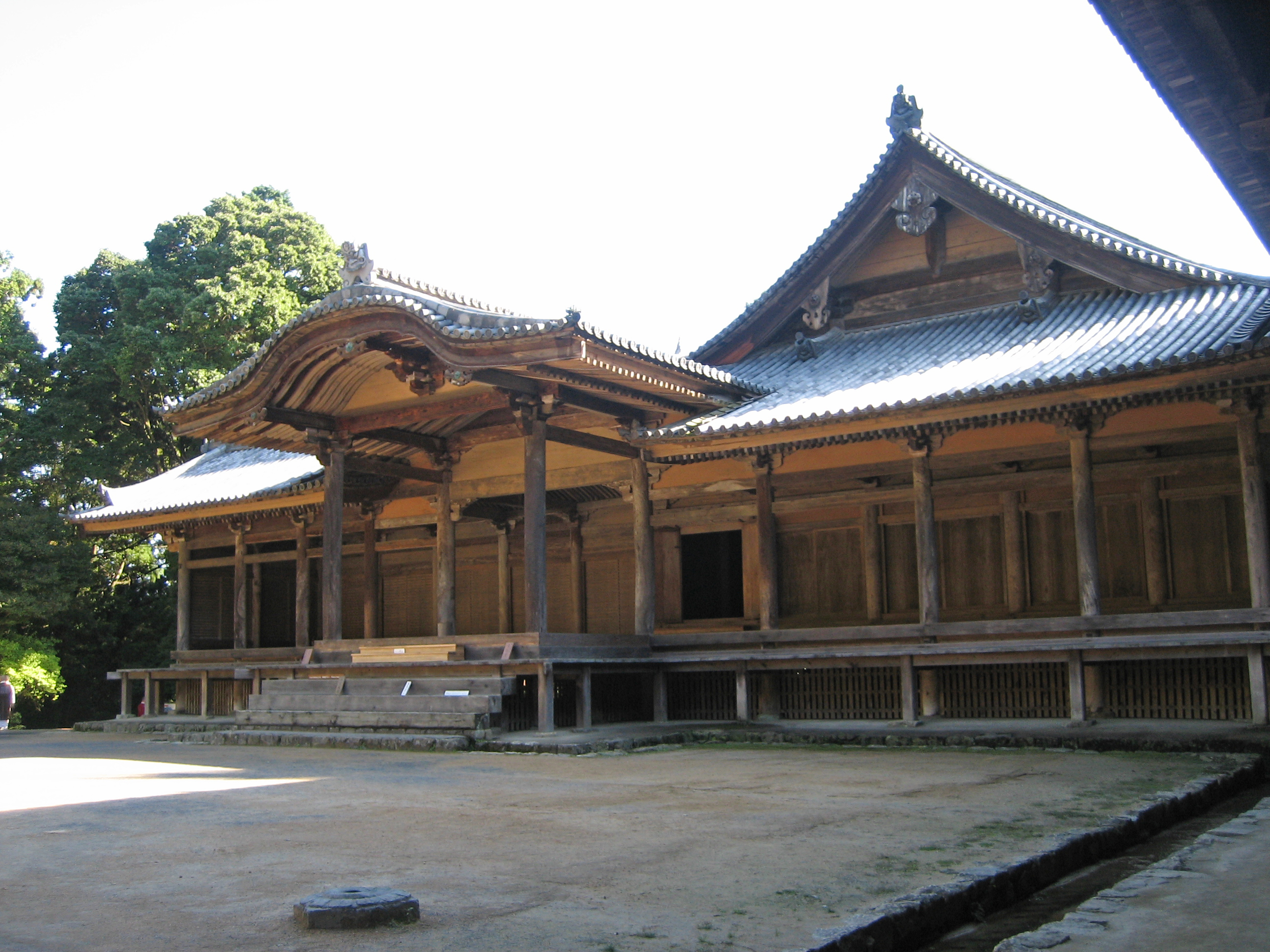 書写山三つ堂の一つ。常行堂。